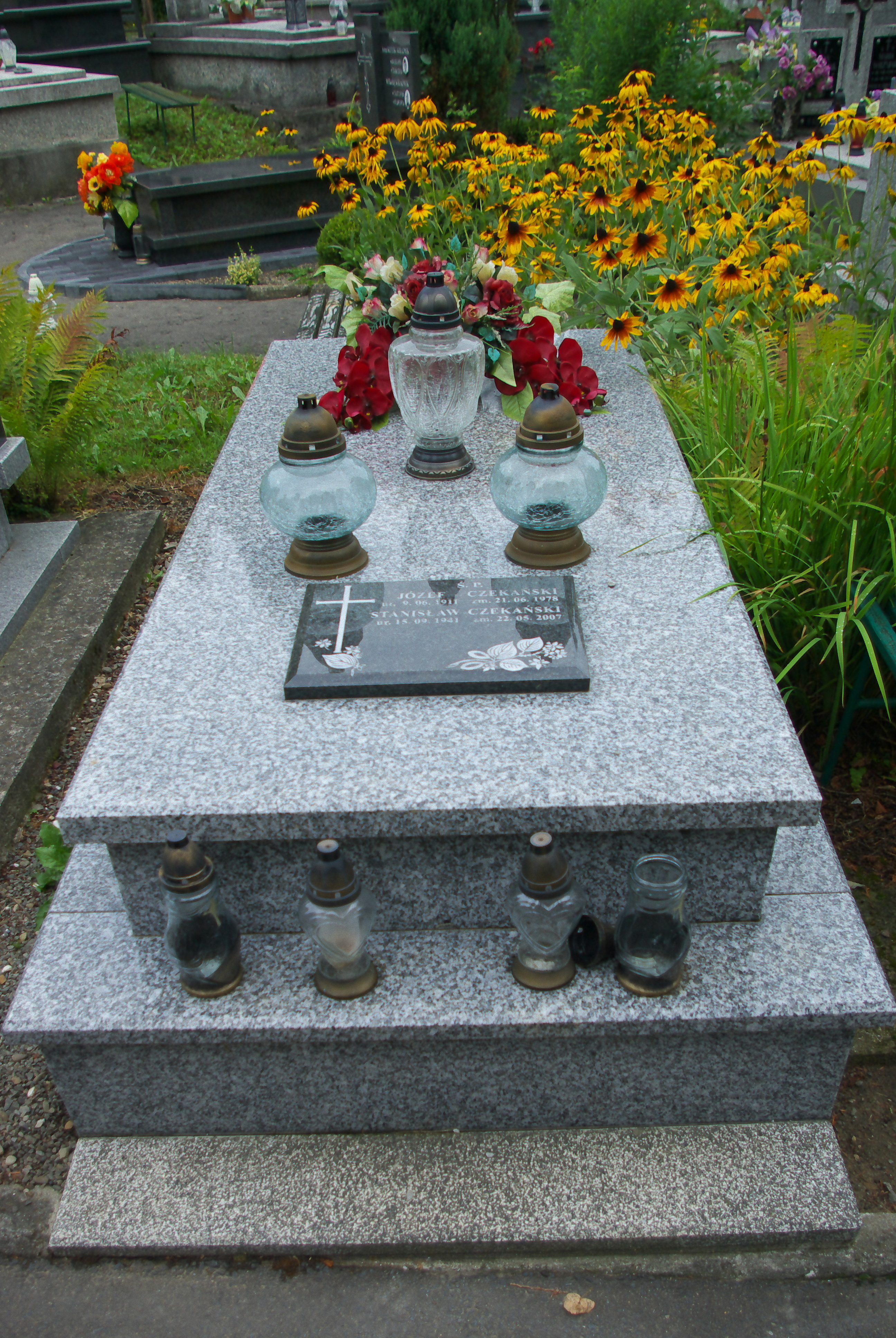 Nagrobek Zenobii Czekańskiej na Cmentarzu Centralnym w Sanoku.